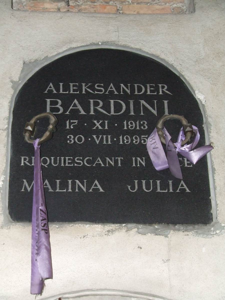 Aleksander Bardini, grób, Stare Powązki